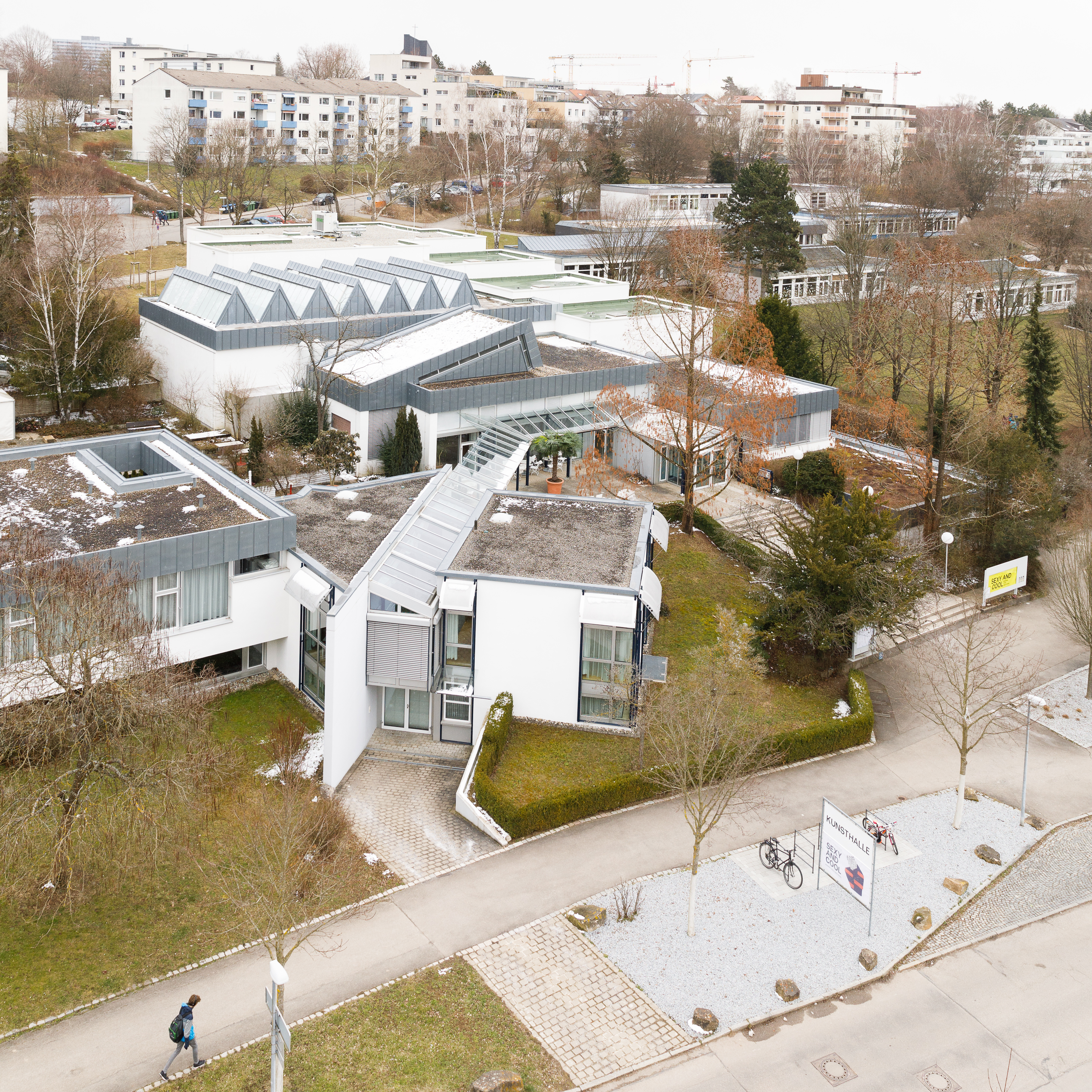 Blick auf die Kunsthalle Tübingen aus der Luft.